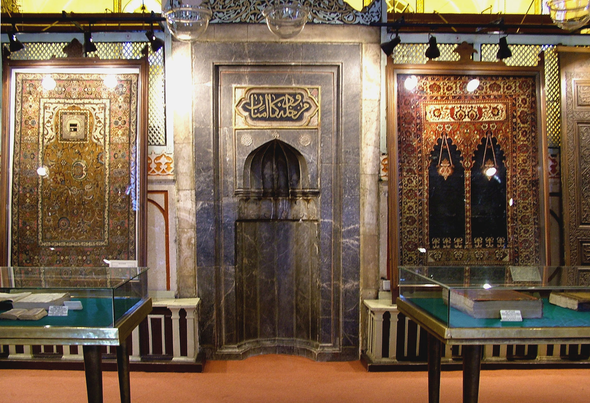 Kolostormecset imafülkéje (Konya, Törökország)